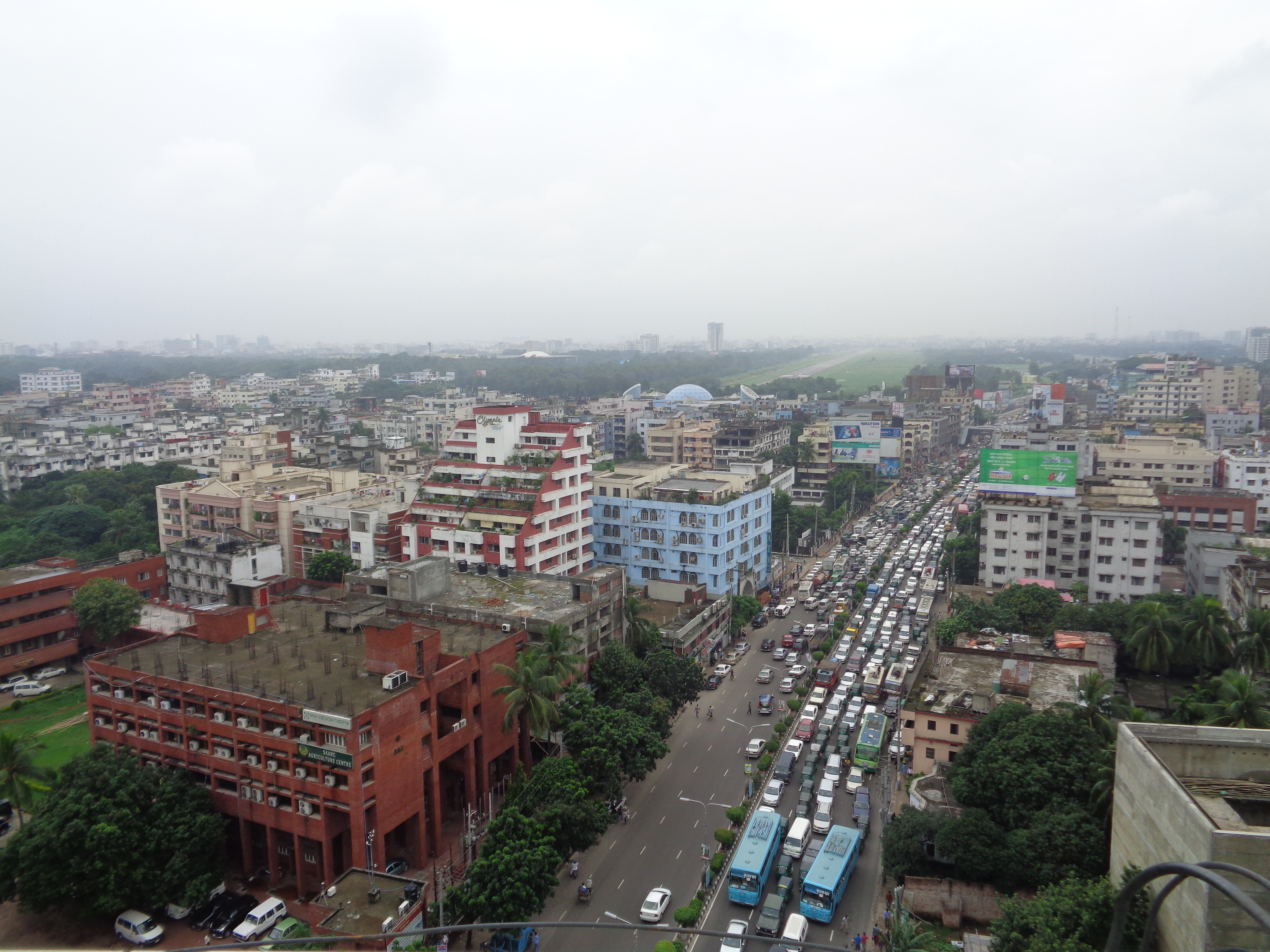 ব্যস্ততম ঢাকা শহরের ফার্মগেট এলাকা